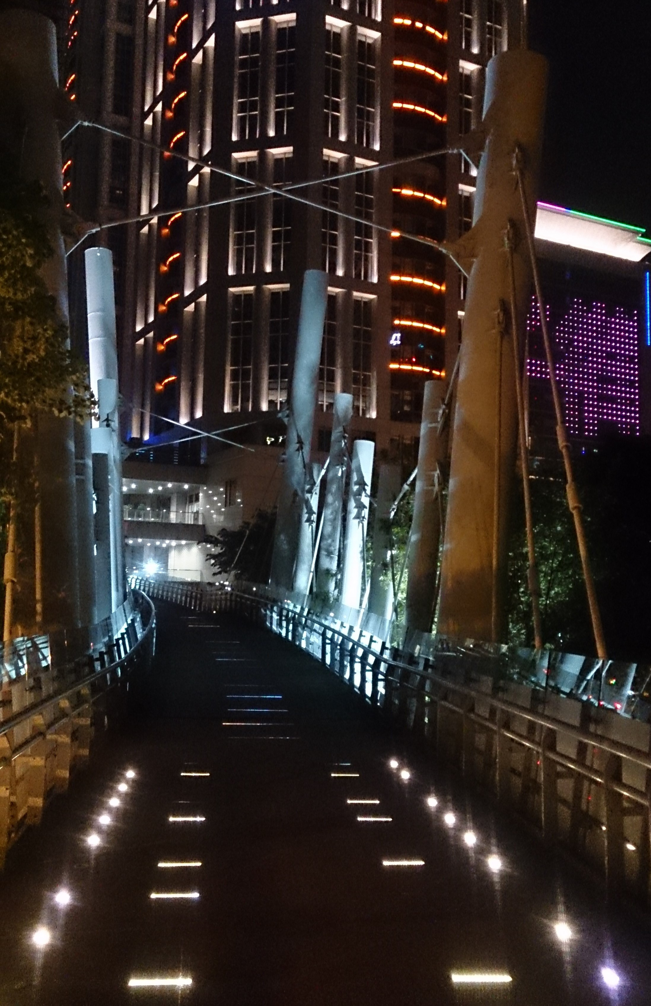 穿梭於新板特區的空中走廊